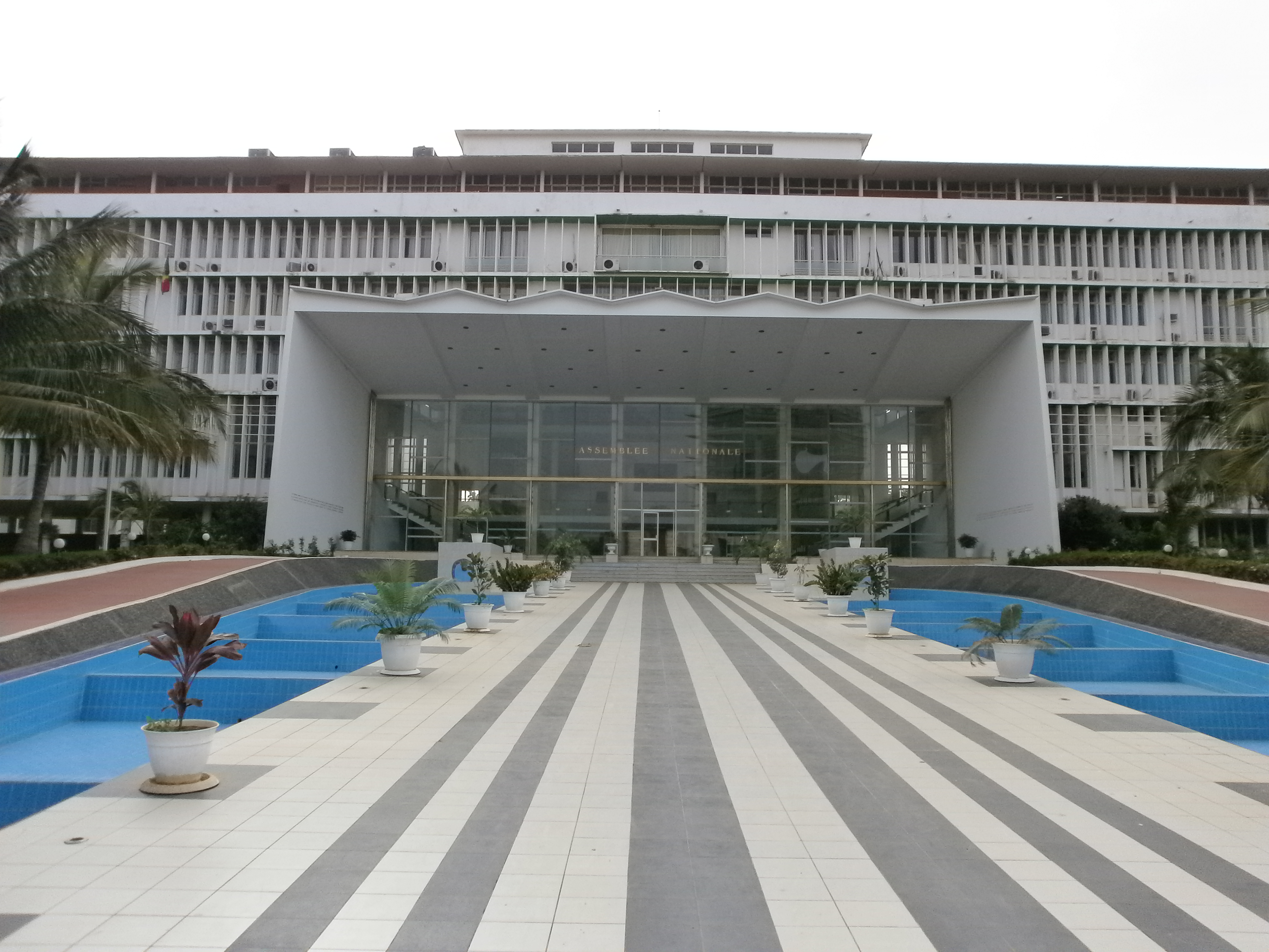 Dakar - Assemblée nationale du Sénégal